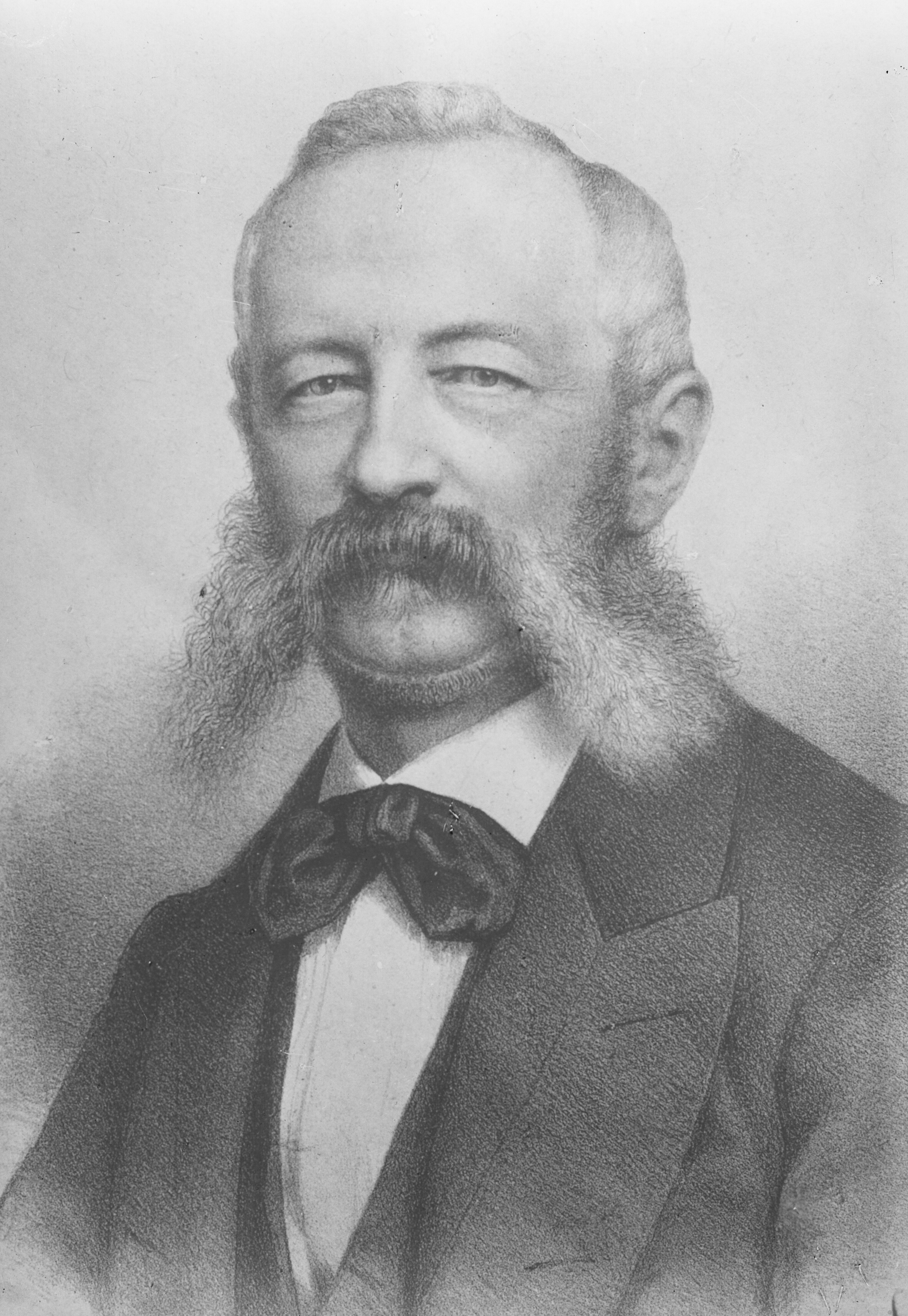 Ludvig Henrik Karl Herman Holstein-Holsteinborg, (18. juli 1815 på Holsteinborg - 28. april 1892) var en dansk lensgreve og politiker (konseilspræsident).